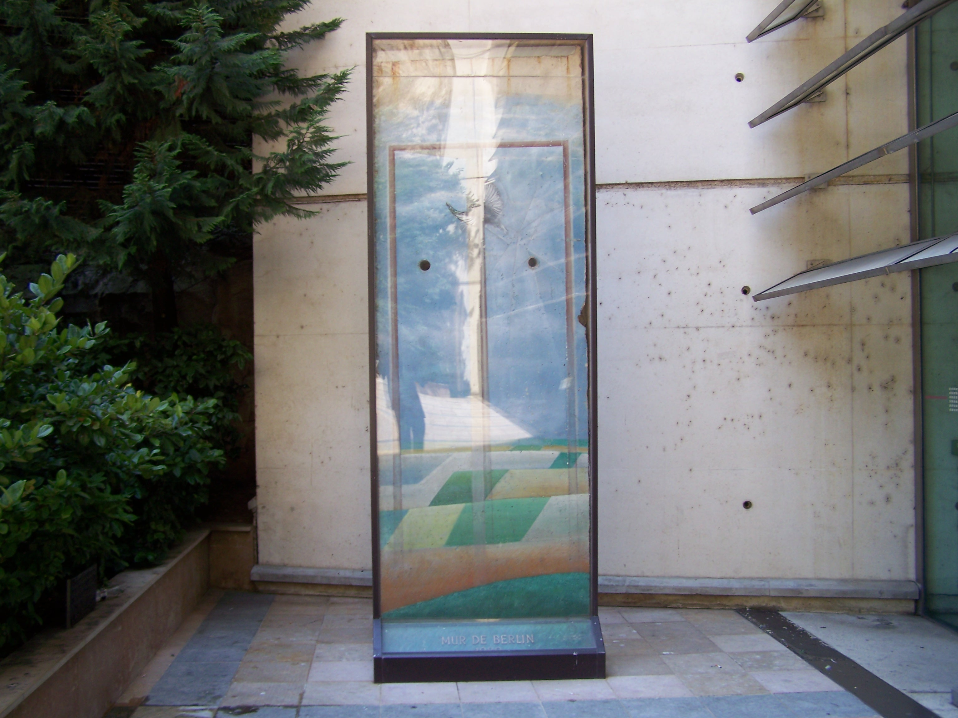 Segment du Mur de Berlin à Monaco